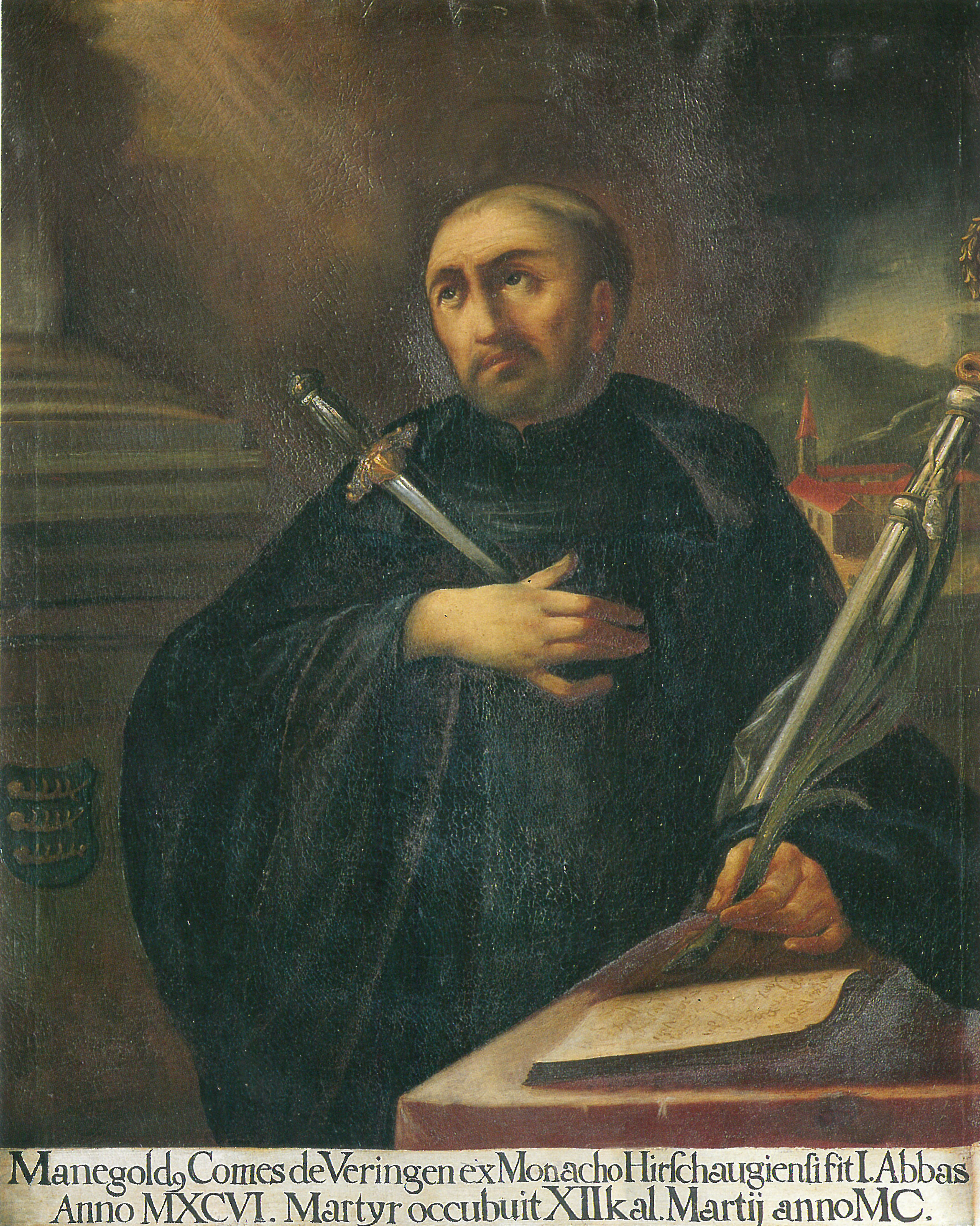 Porträt aus einer Reihe von 48 Äbteporträts in der Marienkapelle der Klosterkirche Isny: der 1. Abt Manegold von Veringen